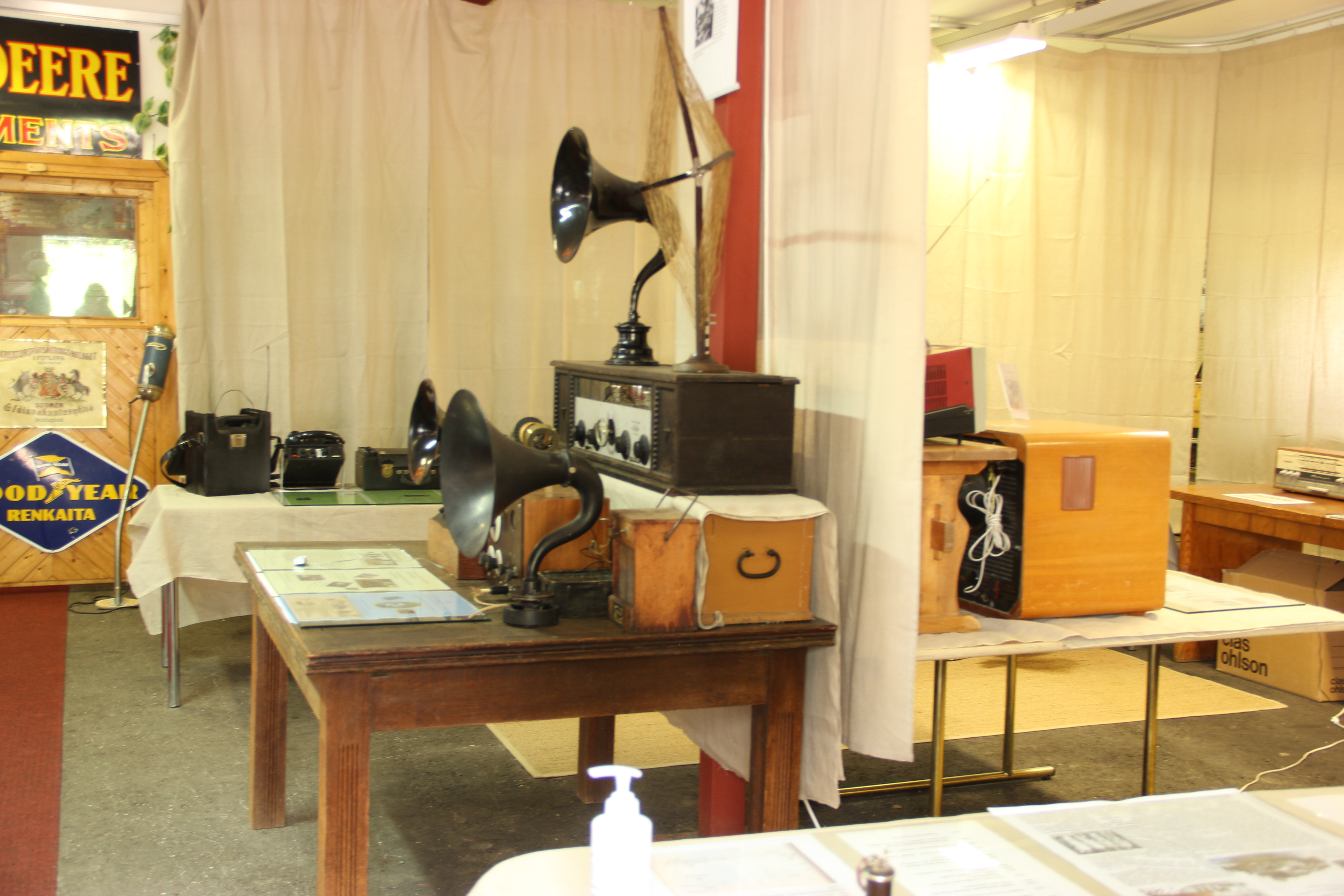 Gårdskullan museo, radio ja äänentoistolaite, josta kuuluu Yhdysvaltain presidentin virkaanastujaispuheen nauhoitus